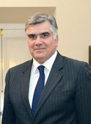 Embajador de Chile en Argentina